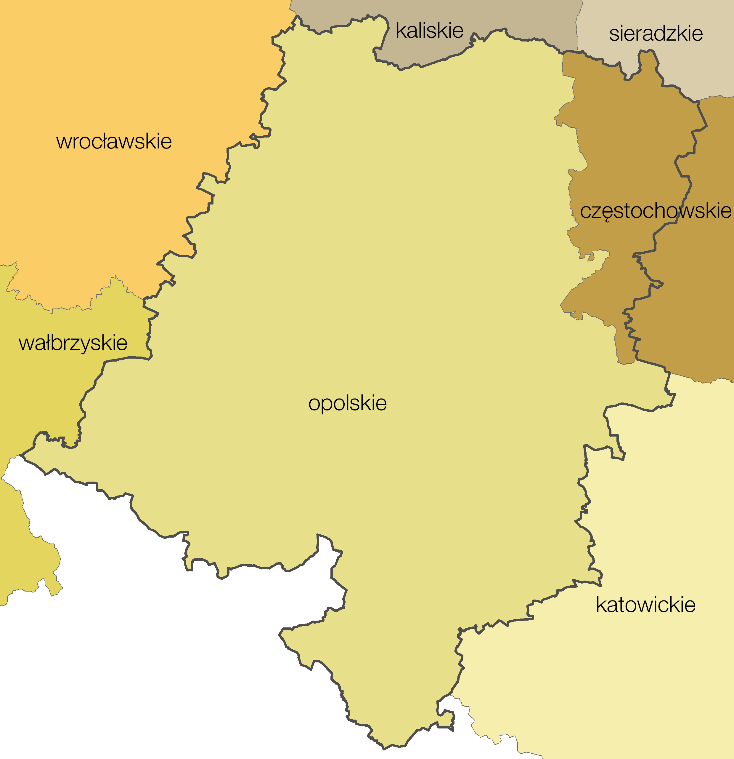 Województwo opolskie (od 1999) jako powstałe z województw podziału administracyjnego Polski z lat 1975-1998